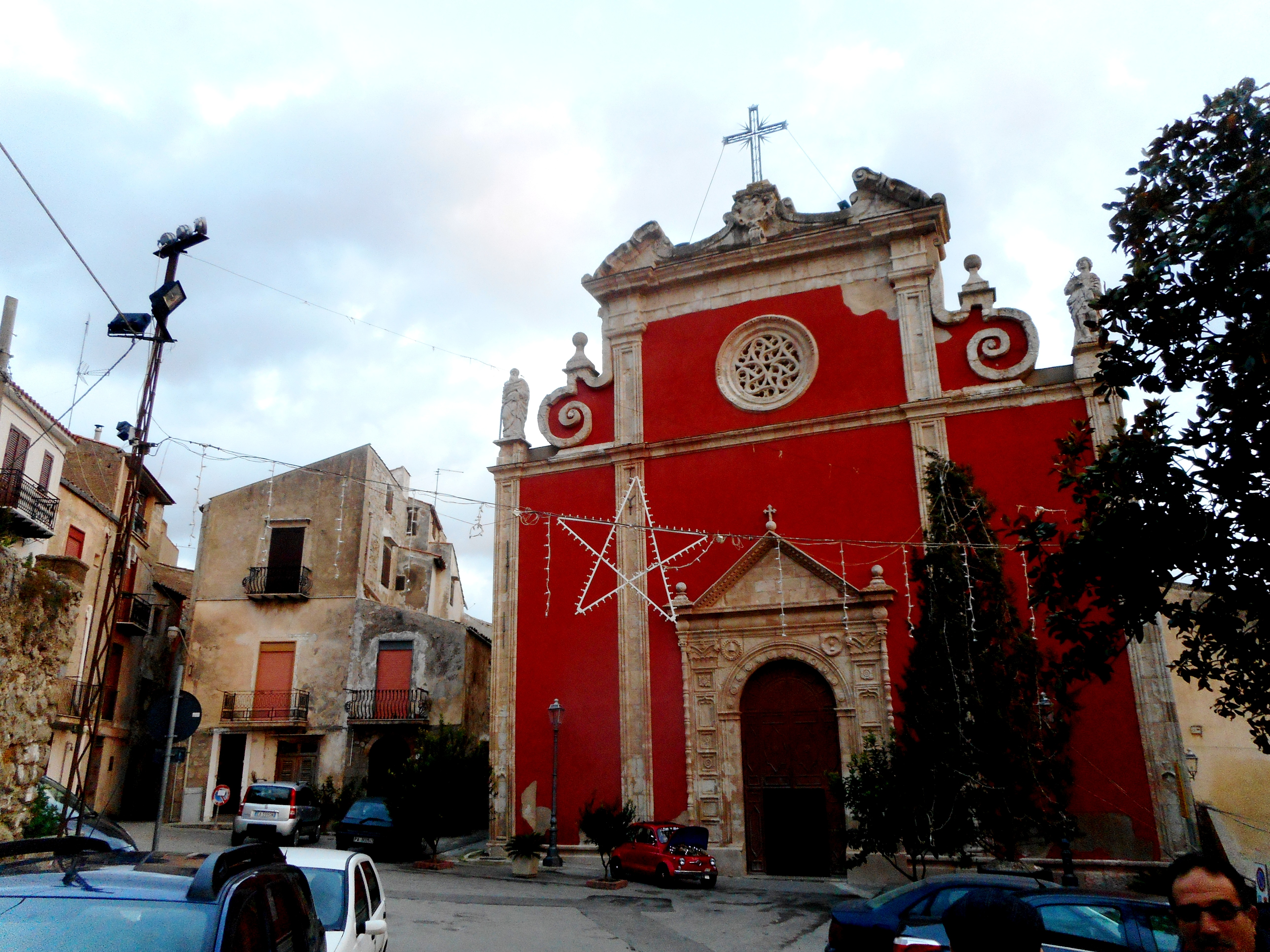 Chiesa Madre di Ciminna dedicata a Santa Maria Maddalena